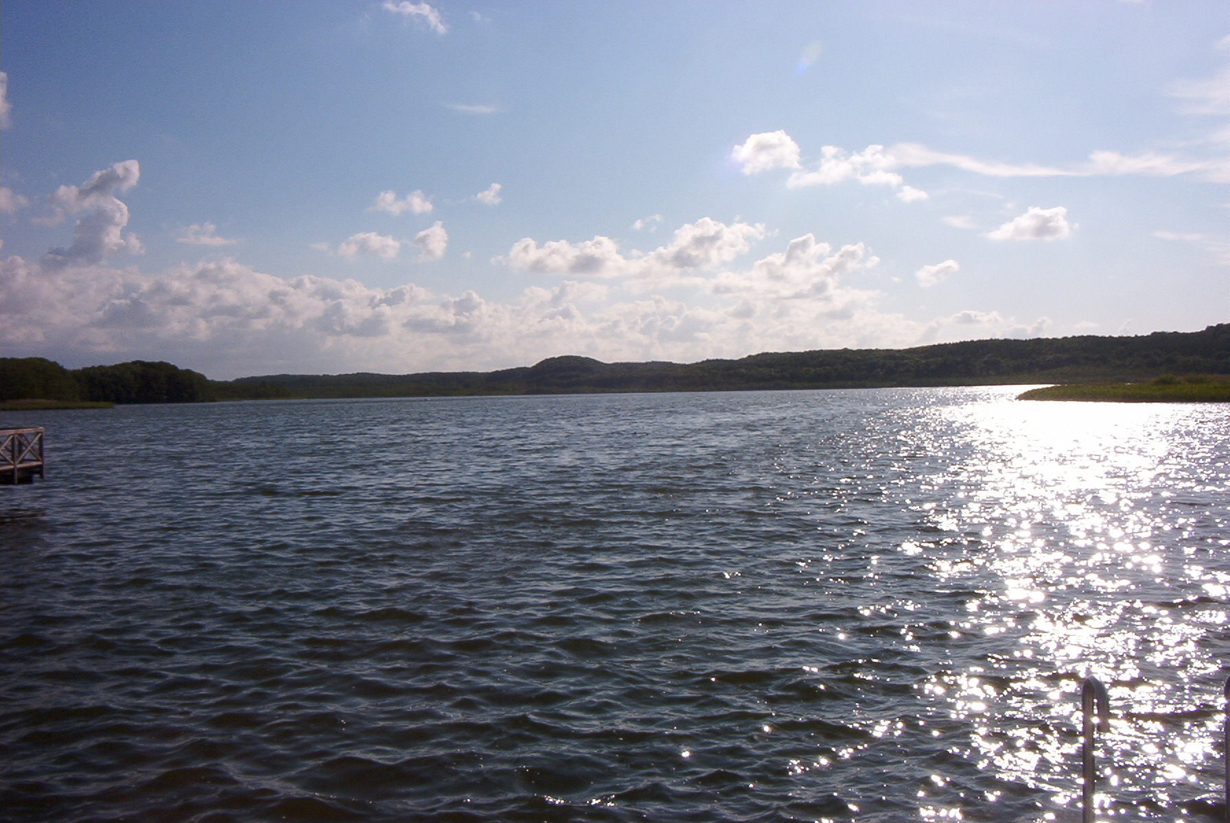 Rügen: Schmachter See bei Binz